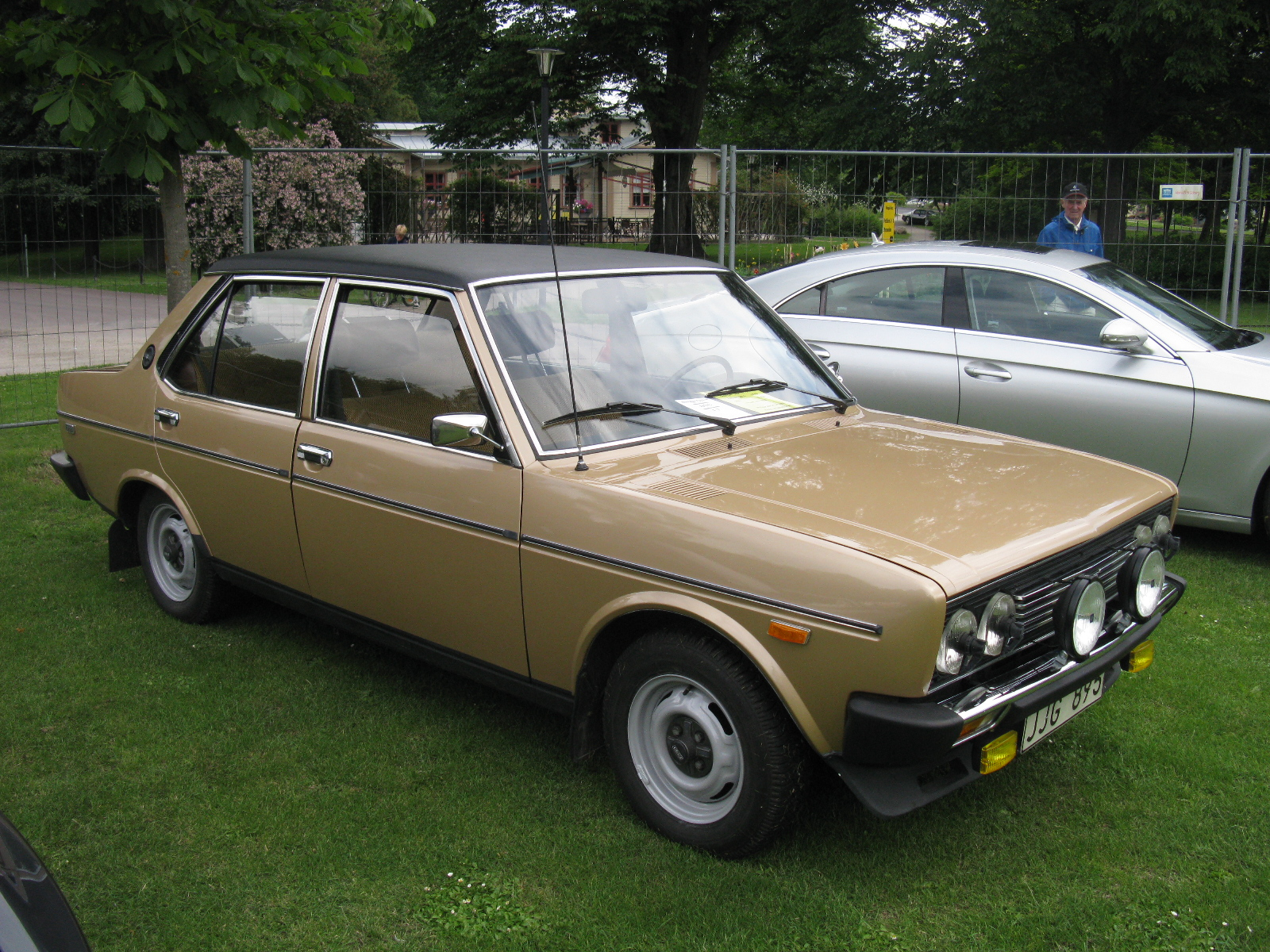 Fiat 131 S Mirafiori